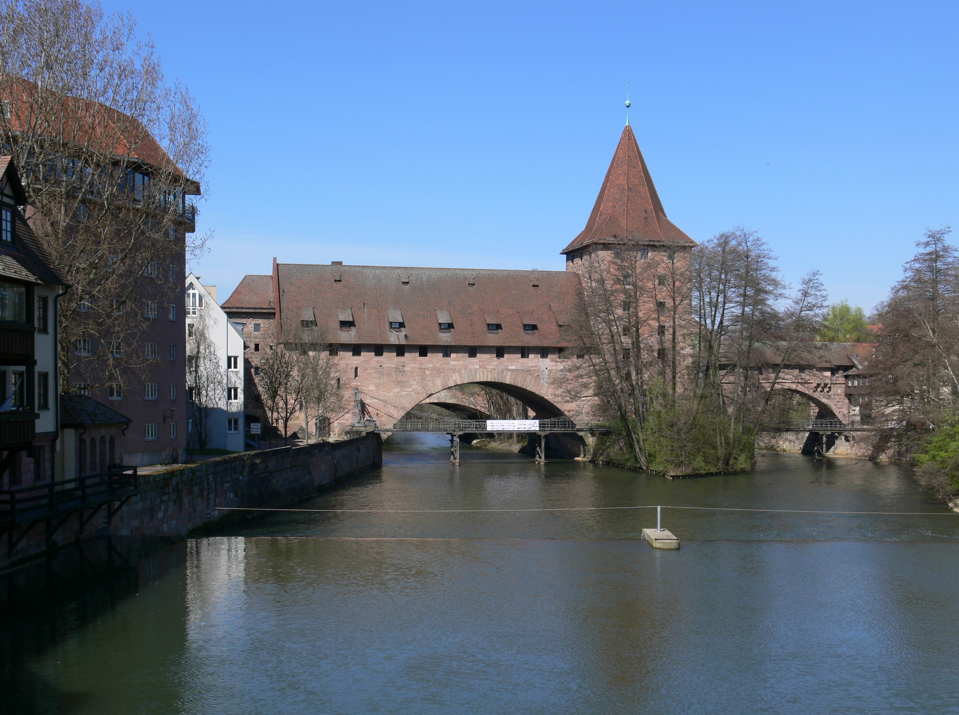 Nürnberg, Schlayerturm (Turm „Grünes F“, Westtorzwinger 2), und Fronveste, Stadtseite